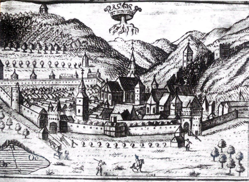 1750-es ábrázolás a városról. Brassó képe 1750-ből.